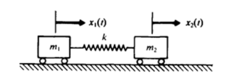 Sistemas semidenifidos